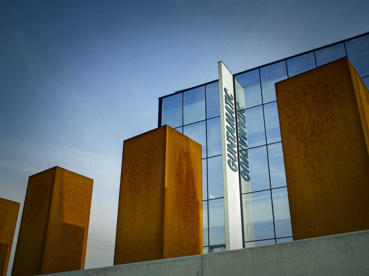 Außenansicht GUNTAMATIC Heiztechnik GmbH Werk Peuerbach